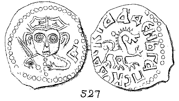 Прорисовка псковской деньги из книги Ивана Иванович Толстого